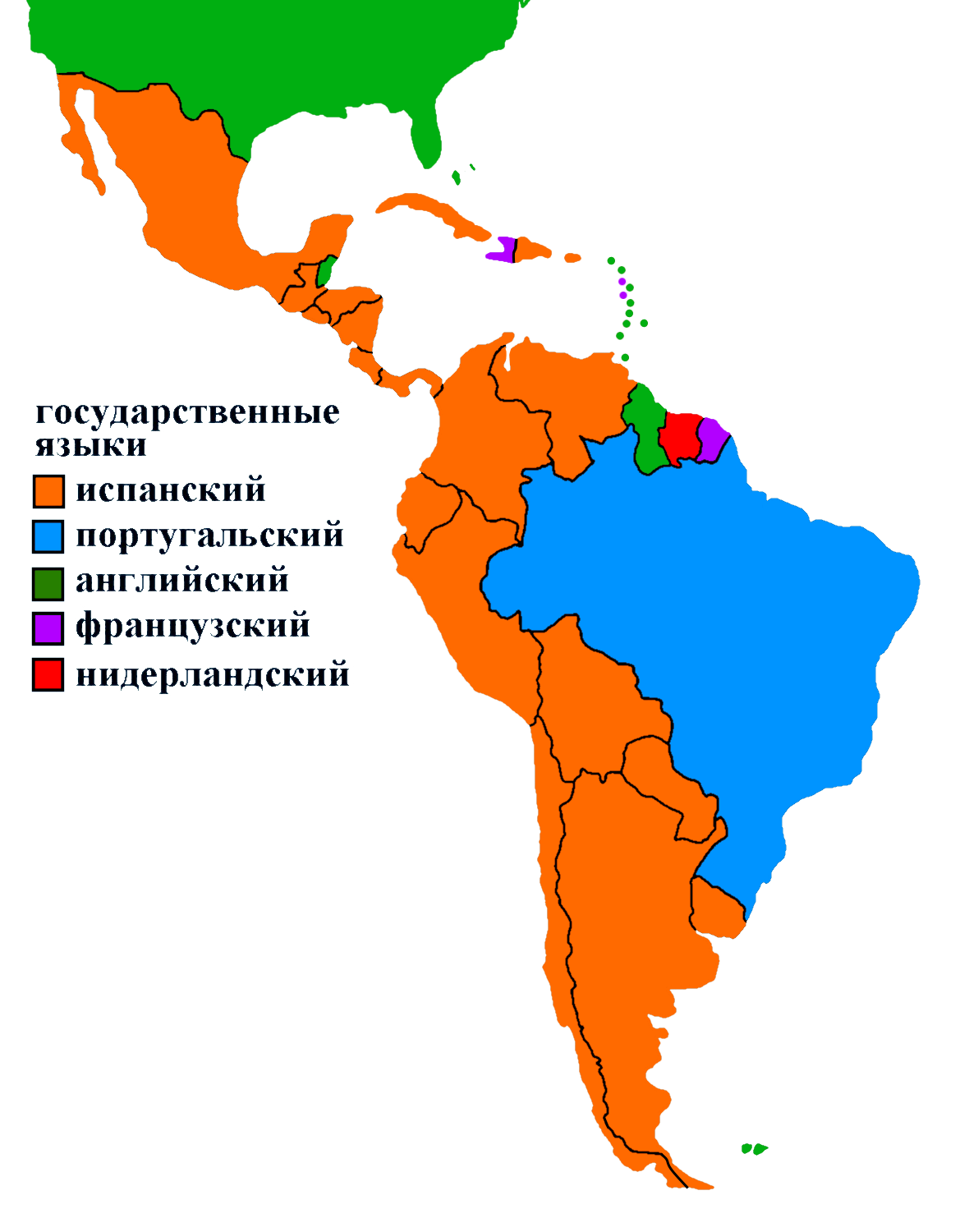 Государственные языки латинской Америки